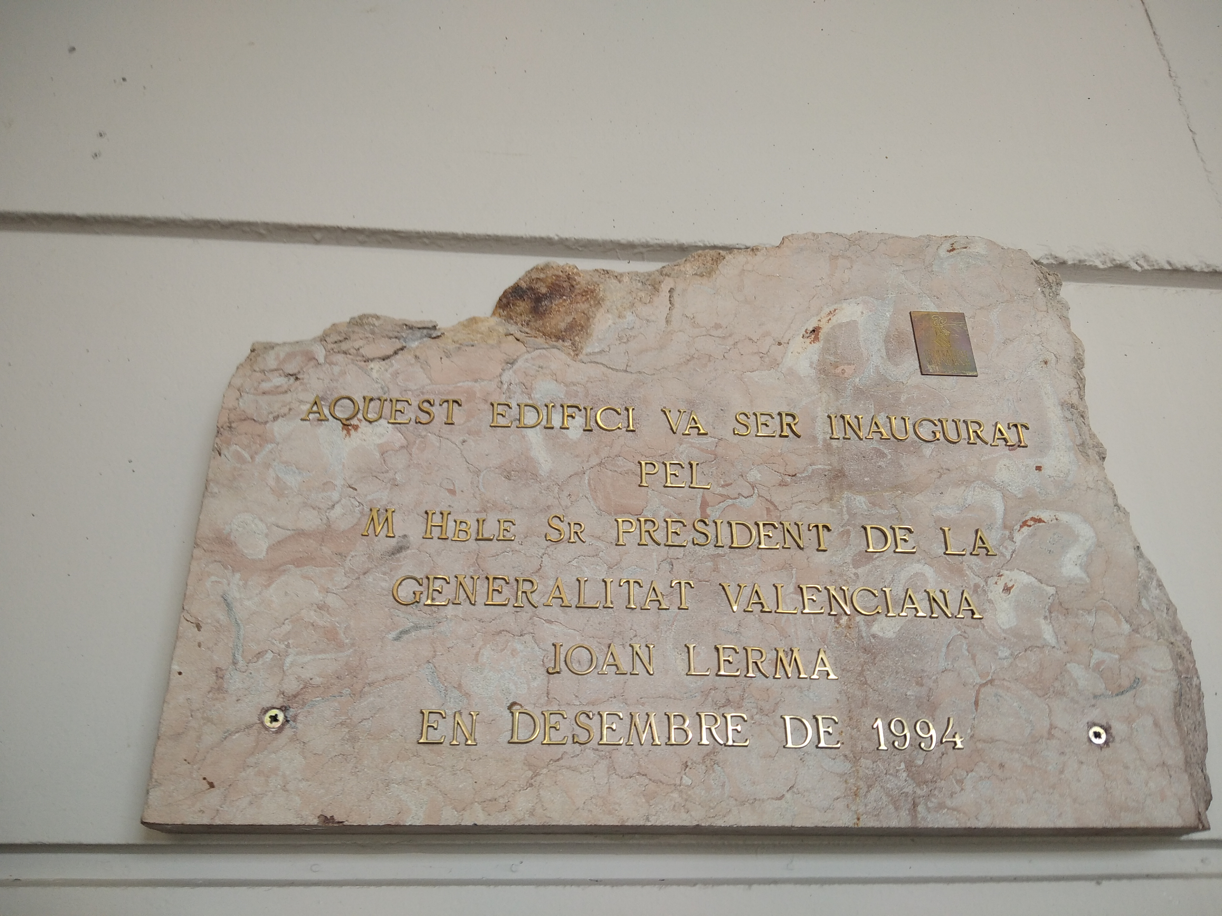 Record de la inauguració del Museu de la Valltorta en desembre de 1994. El President de la Generalitat Valenciana, Joan Lerma, va assistir-hi.